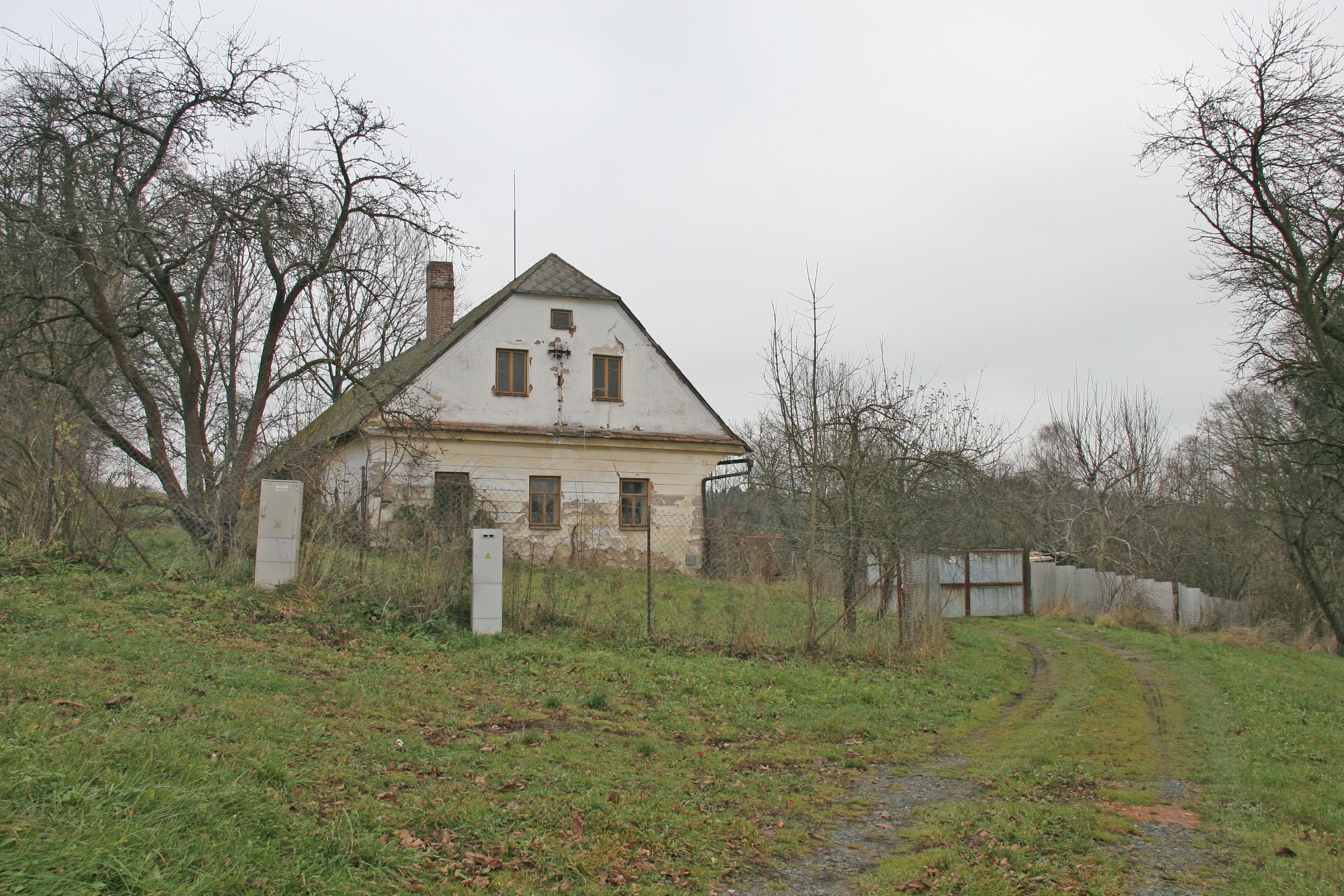 Petrkov čp. 1